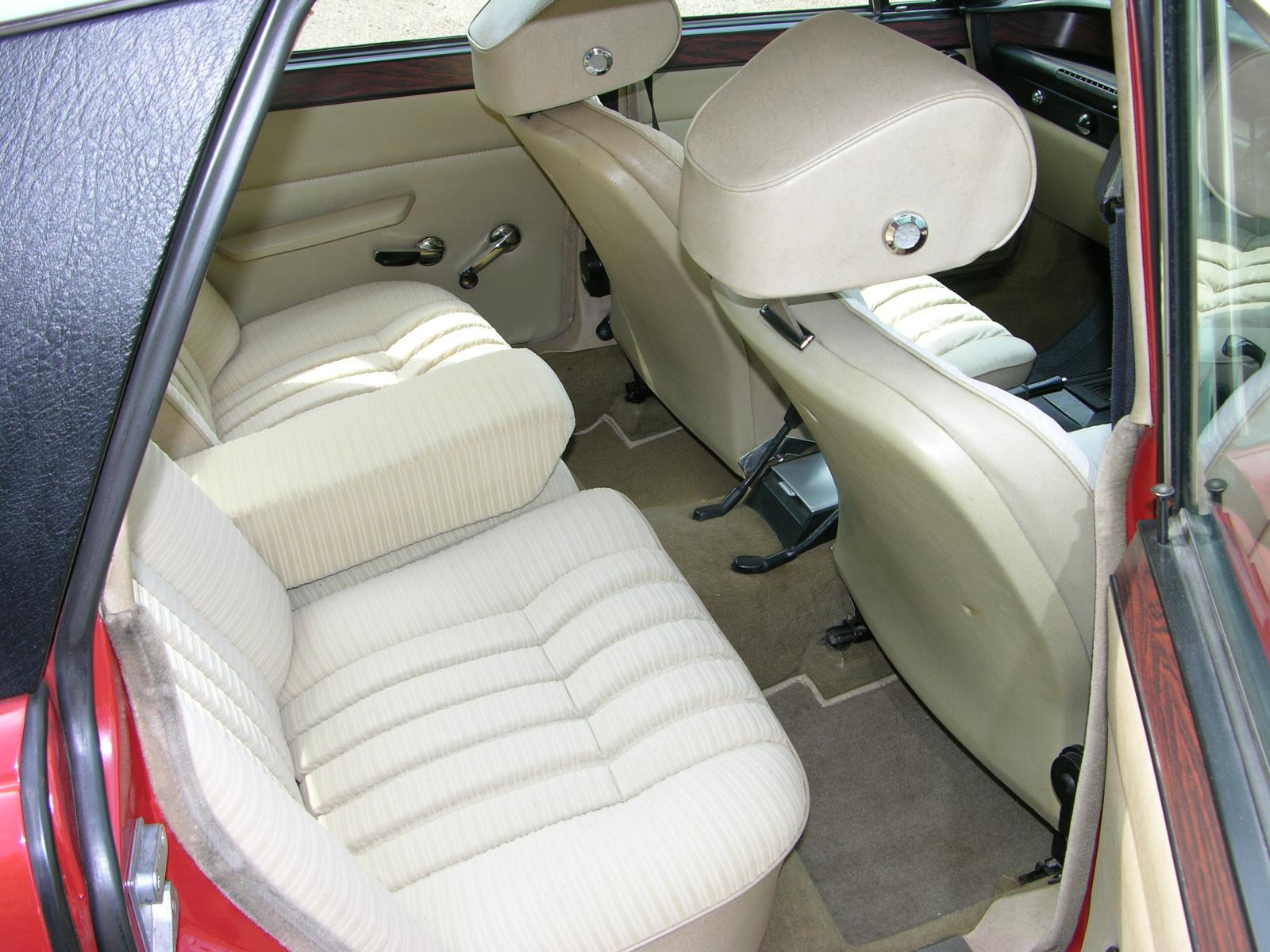 Rover 3500 V8